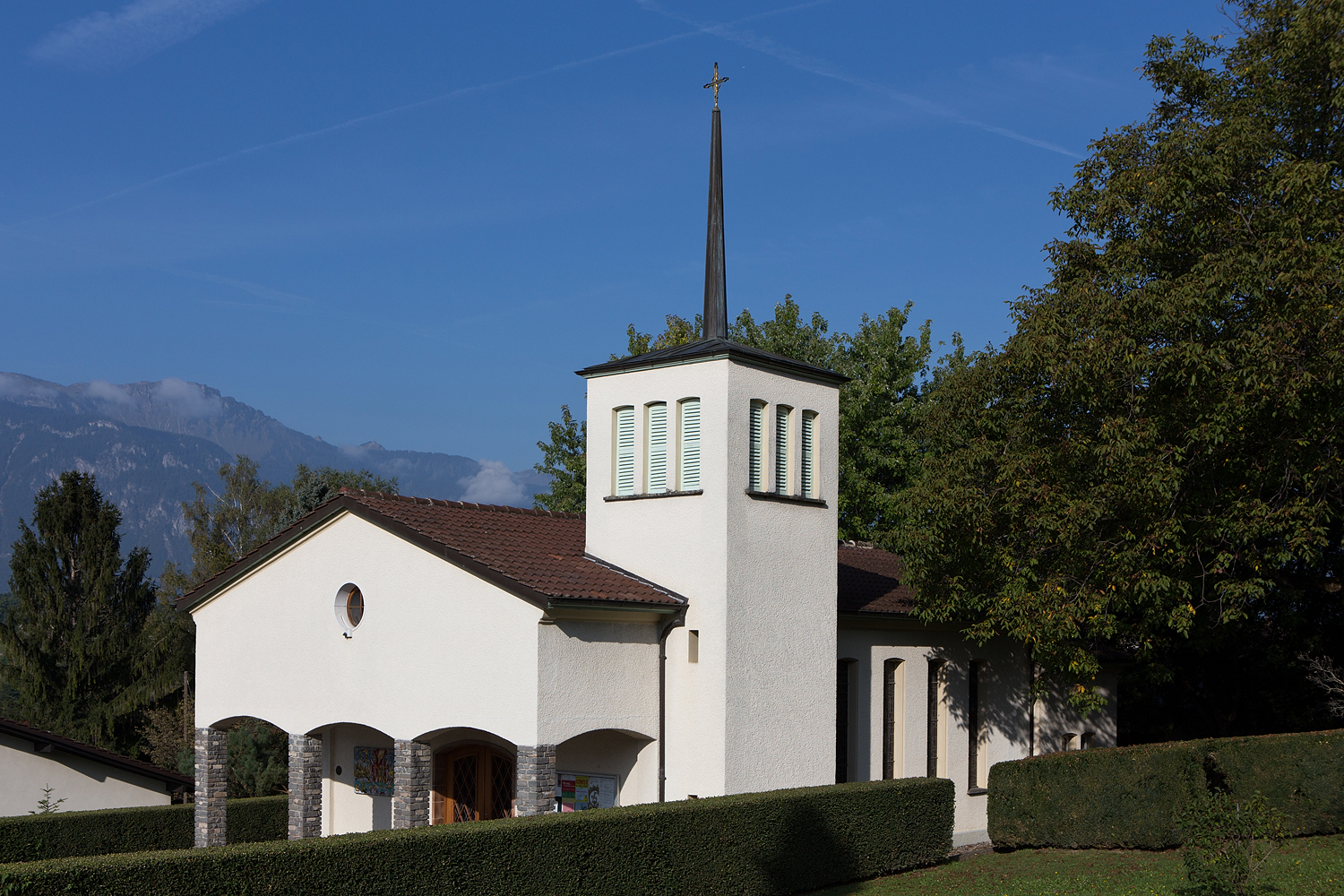 Katholische Kirche in Ollon